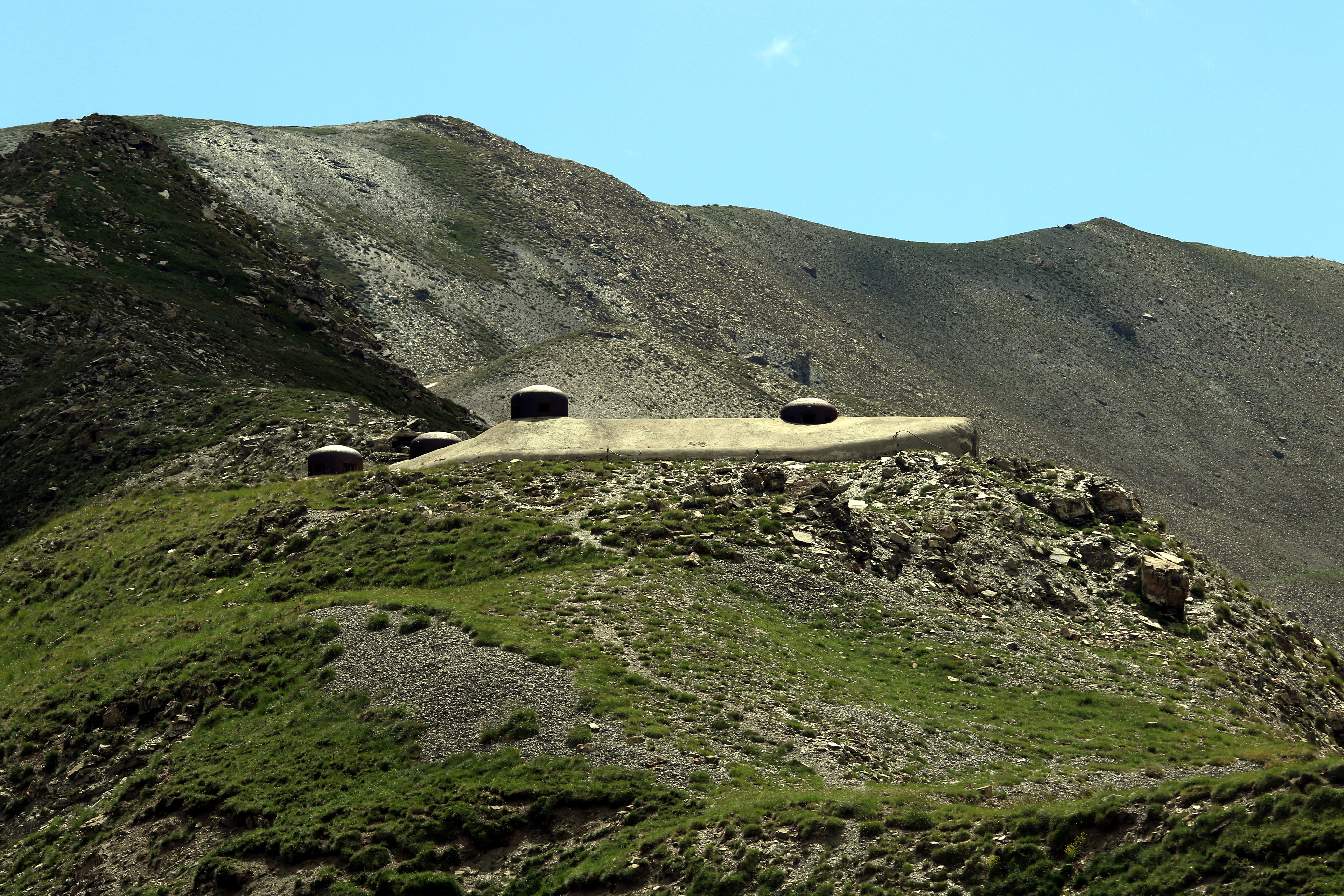 Le bloc 2 de l'ouvrage de Grange-Commune